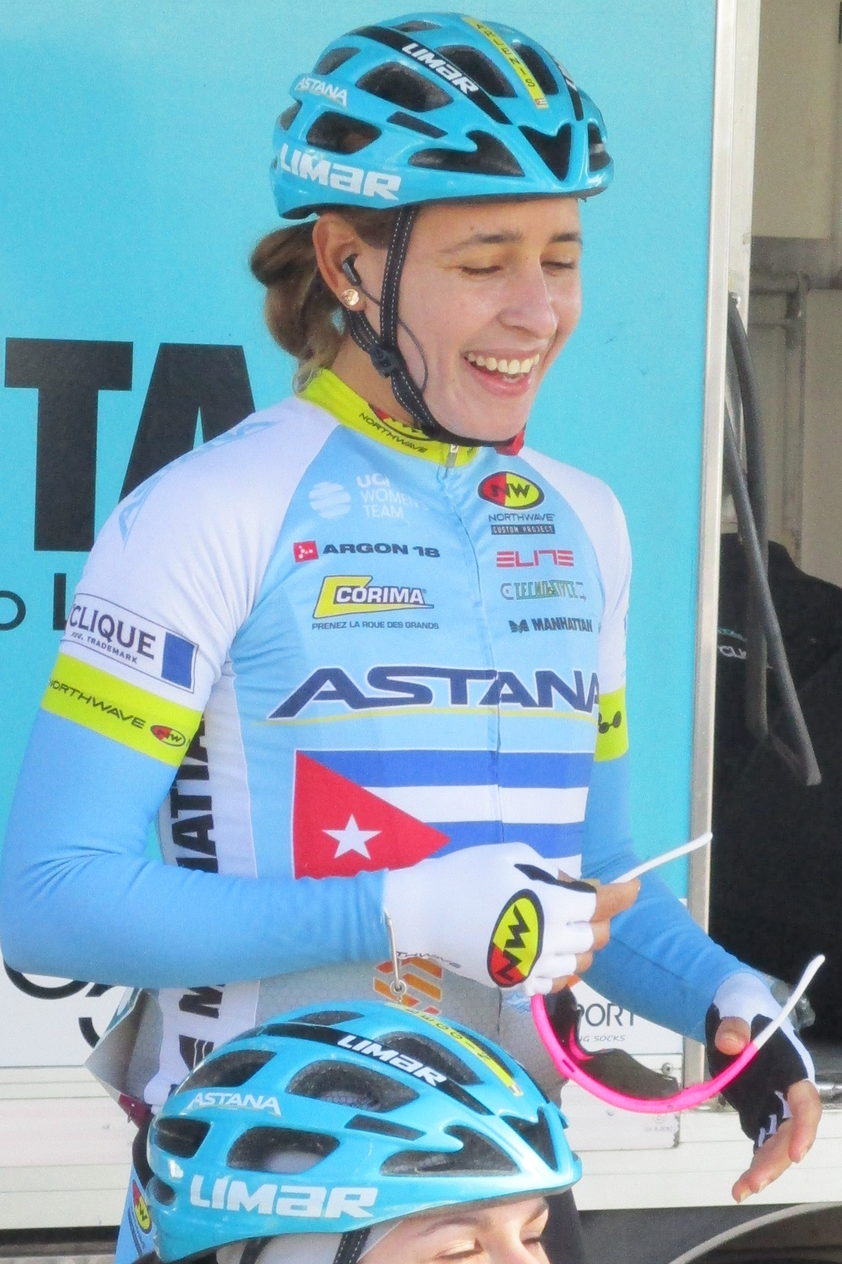 Start van de Amstel Gold Race Ladies Edition 2018 in Maastricht.